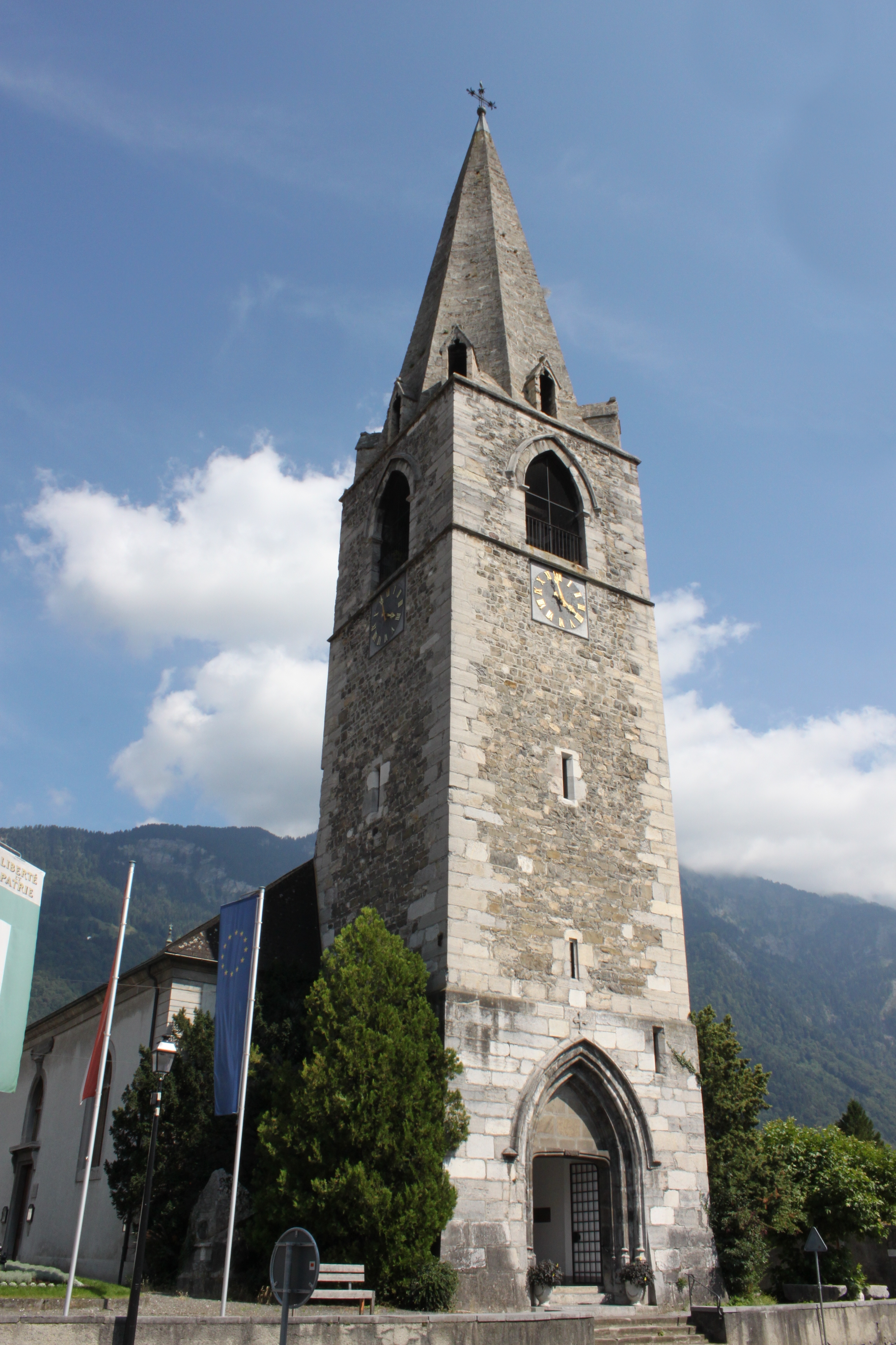 Clocher de l'église de Bex (Suisse)